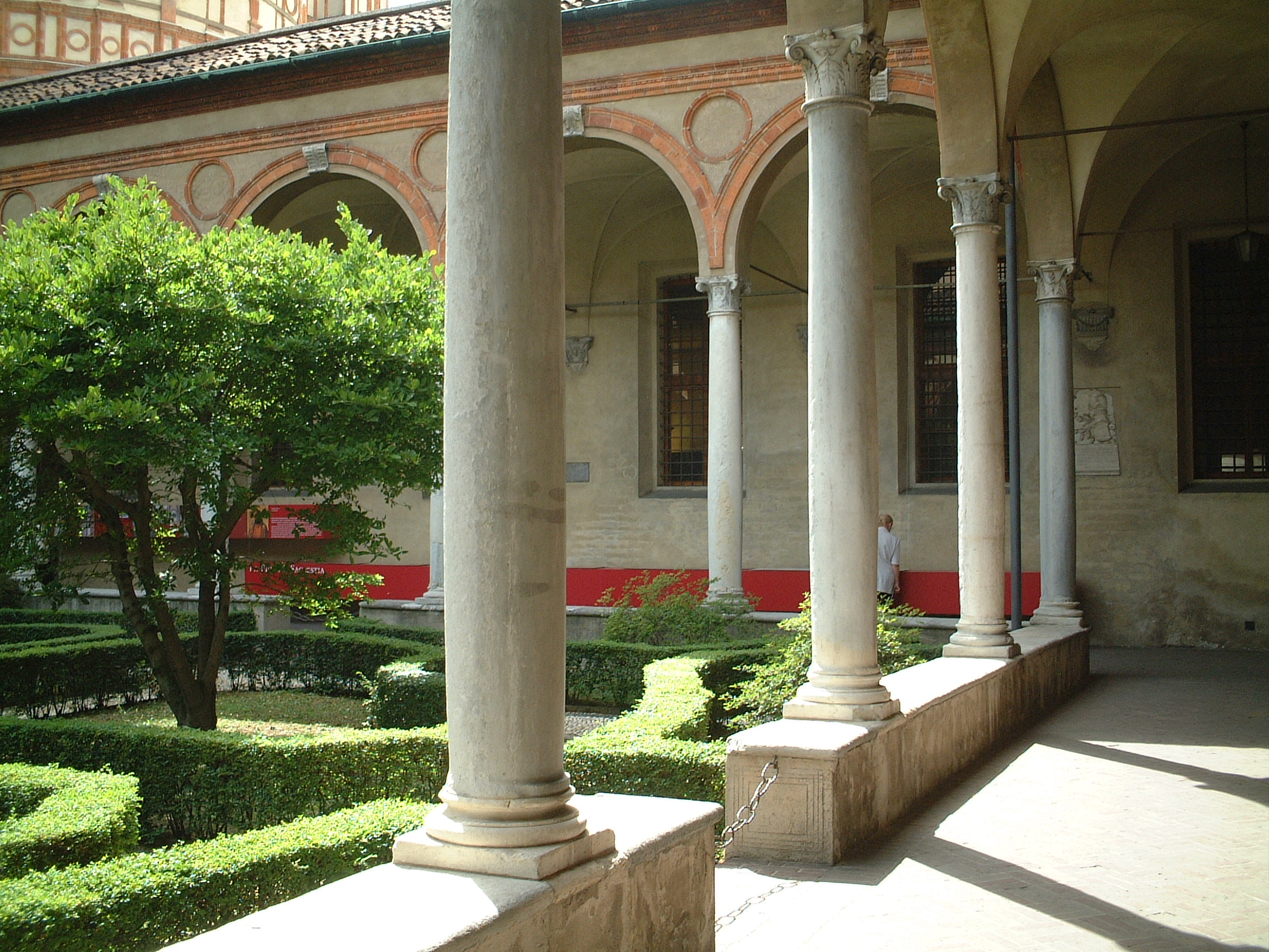 Chiostro di Santa Maria delle Grazie in Milan, Photo taken in MilanoItaly